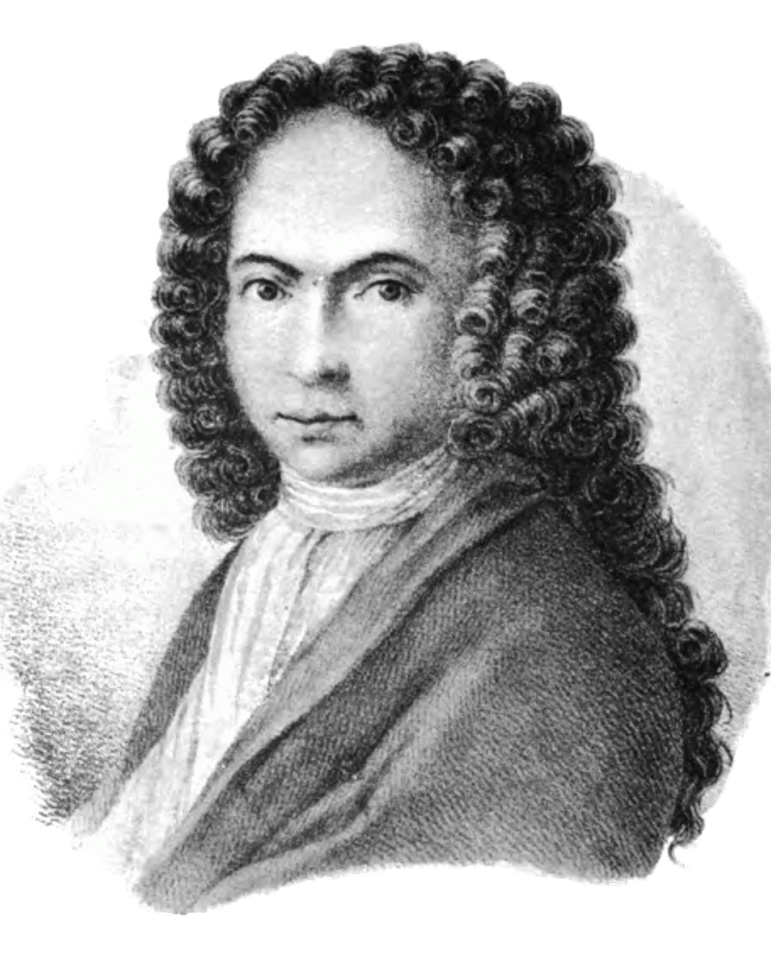 Giovanni Gondola. From the Galleria di Ragusei Illustri